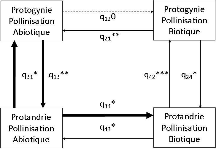 Schéma des transition entre les combinaisons possible entre les 2 type de dichogamie (protandrie et progynie) et les 2 modes de pollinisation (Abiotique et Biotique)